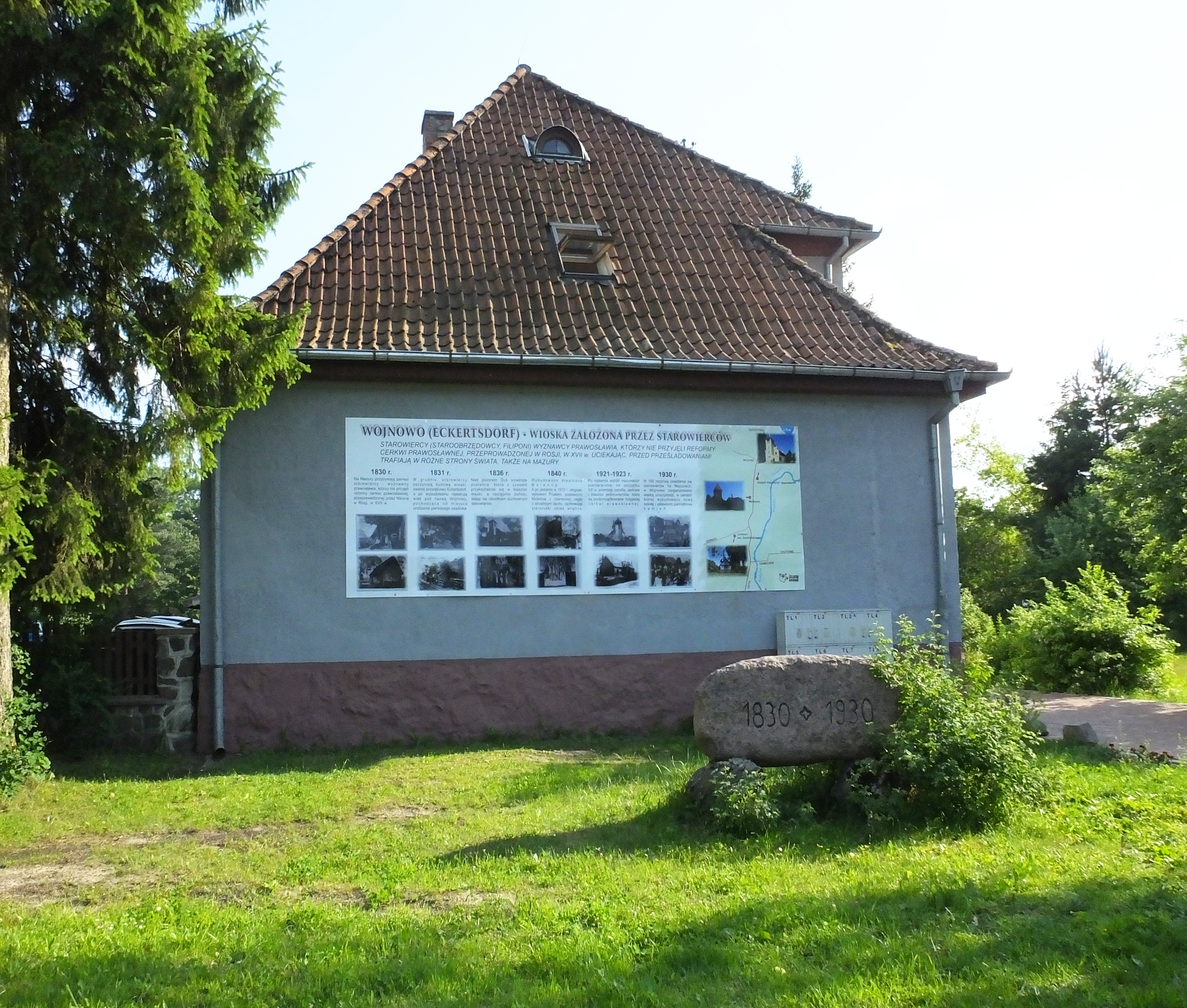 Wojnowo k. Rucianego-Nidy. Szkoła